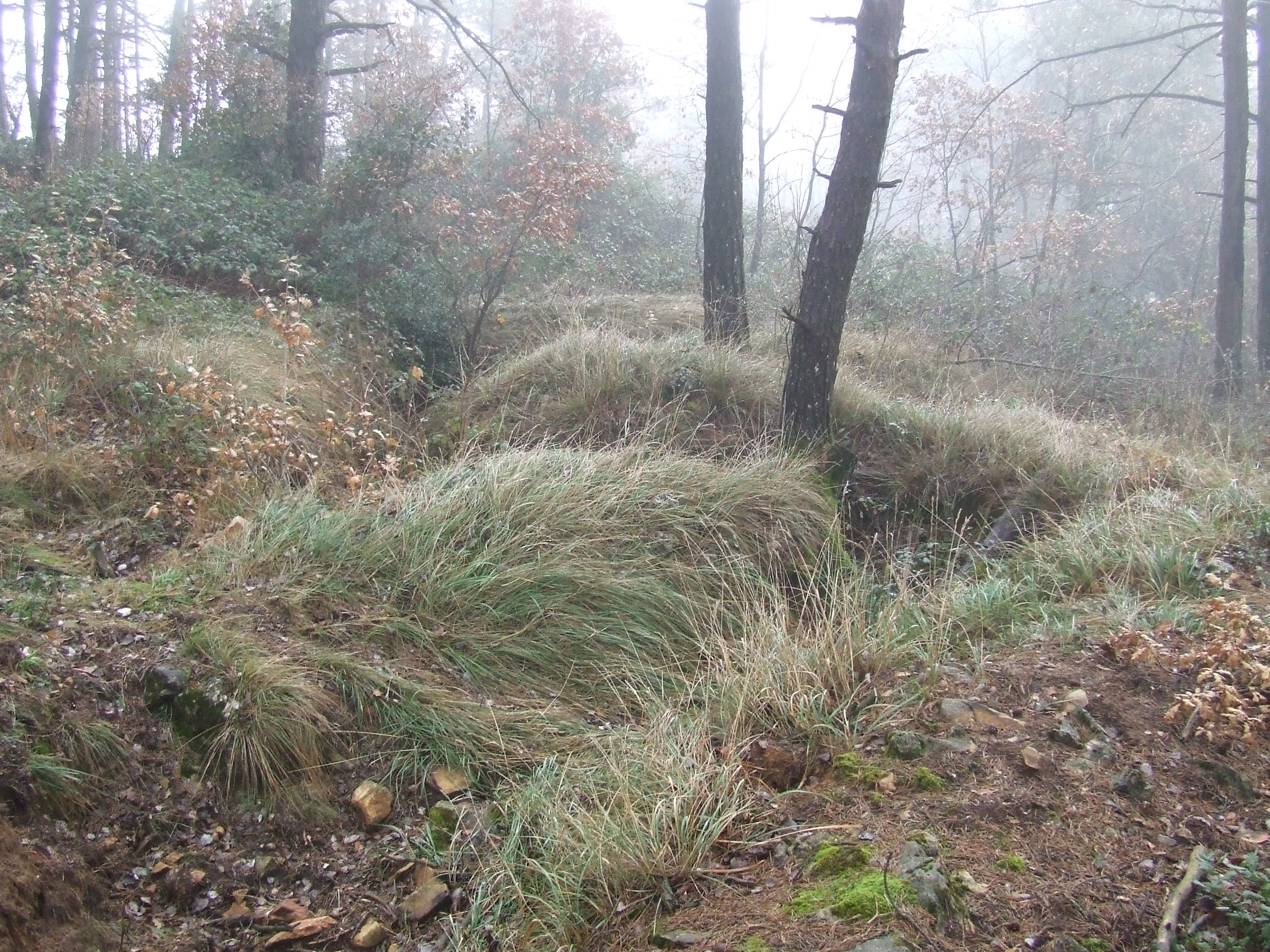 Trinxeres de la Guerra Civil a l'entorn del santuari de la Mare de Déu de Bonrepòs (Sant Salvador de Toló, Gavet de la Conca, Pallars Jussà)